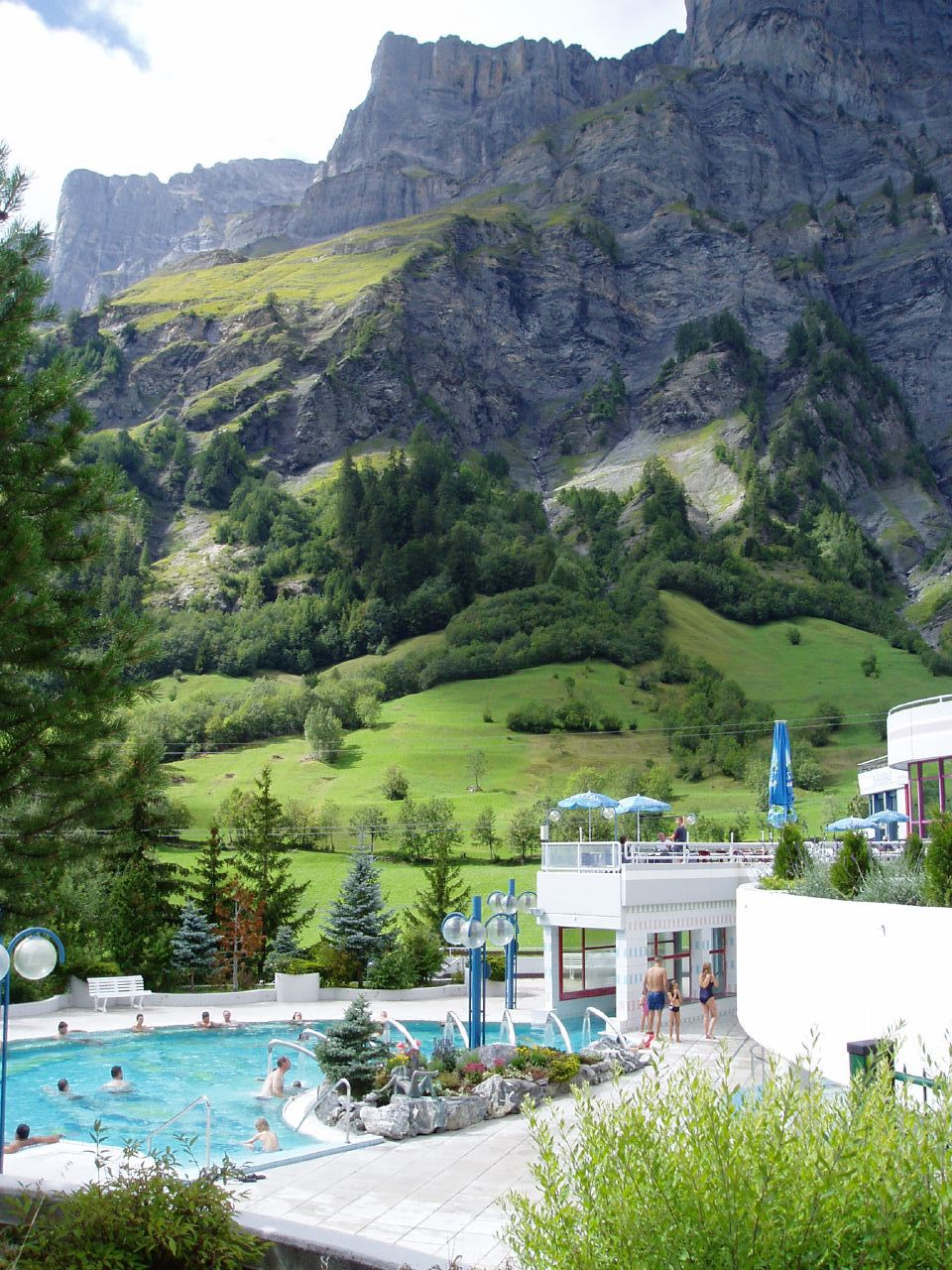 Leukerbad, Valais